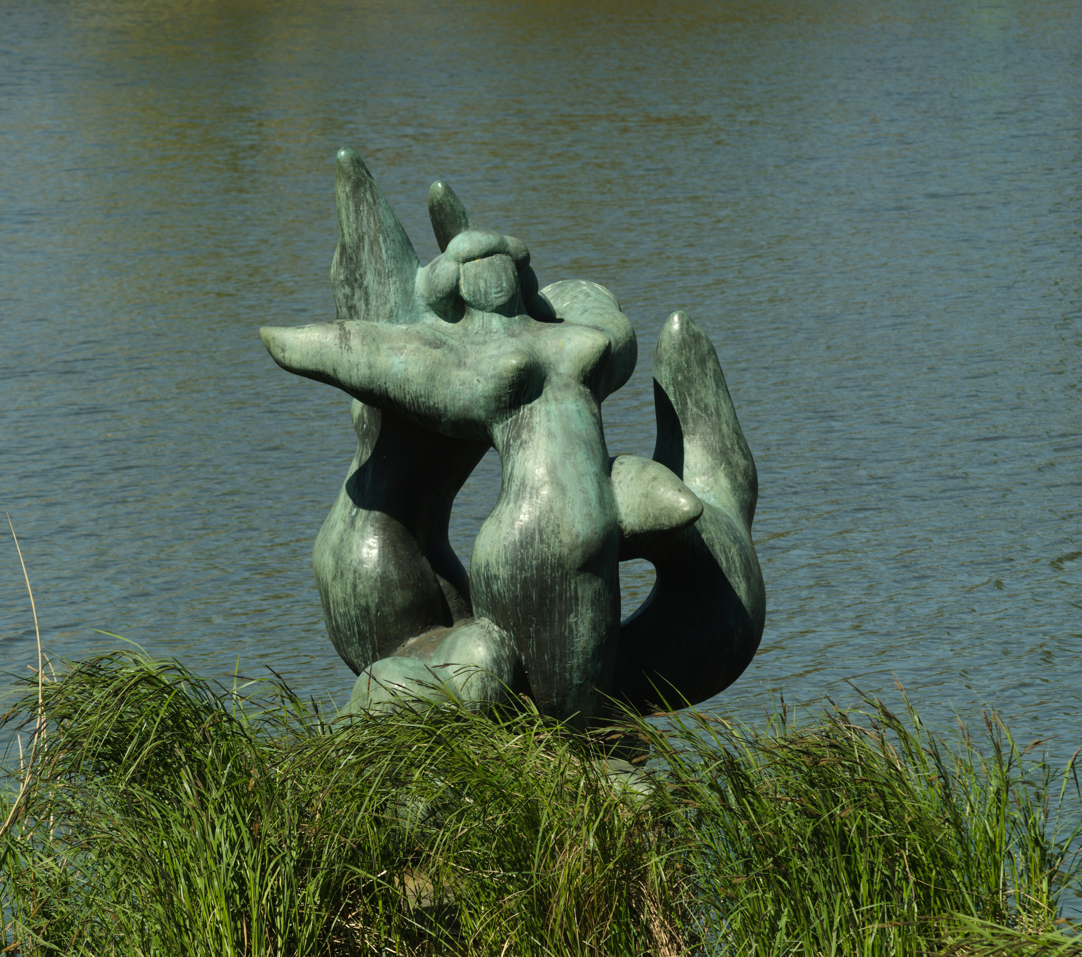 Nic Jonk - ‘Sirenen’ 1970